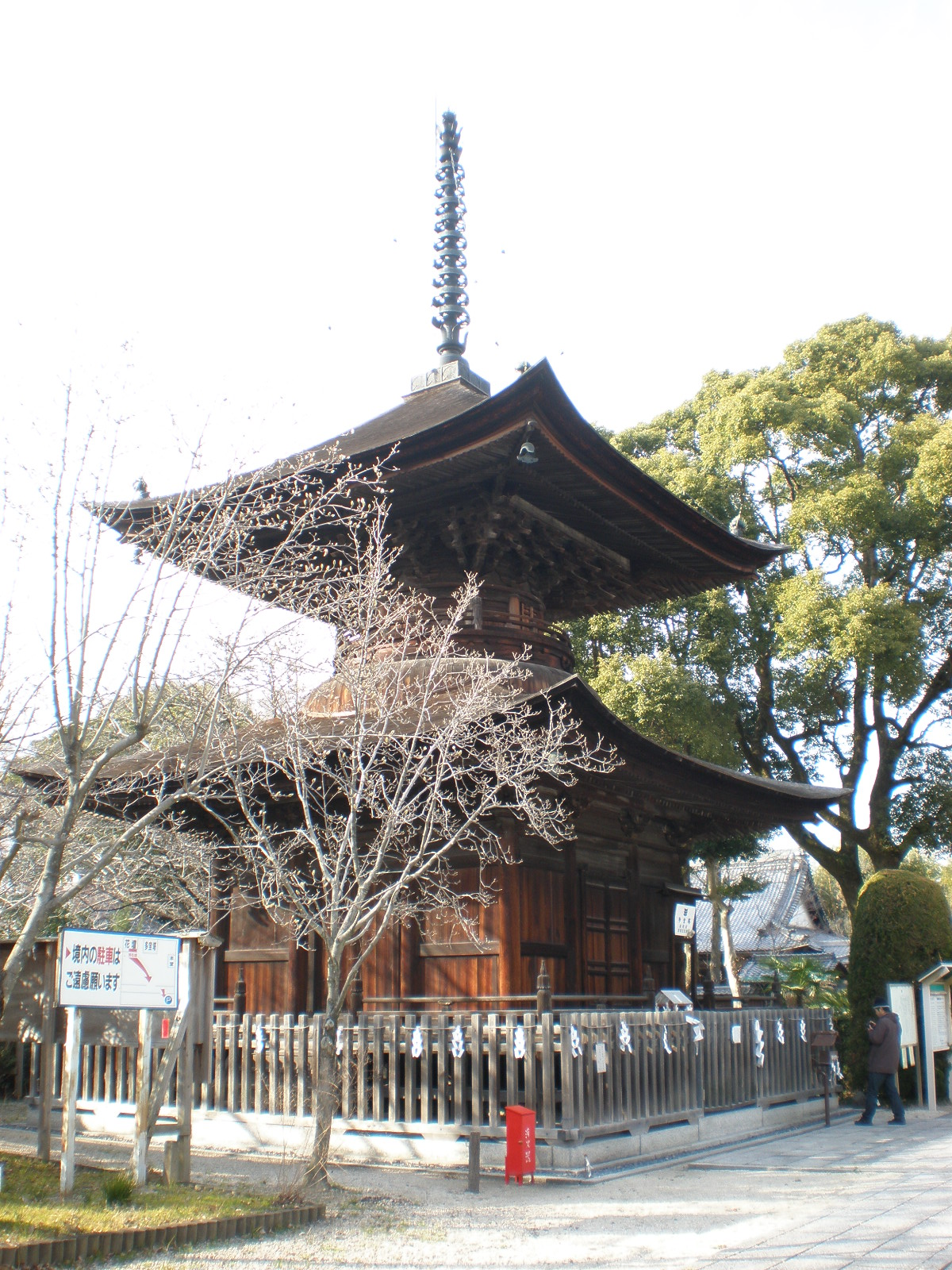 愛知県春日井市にある密蔵院の多宝塔